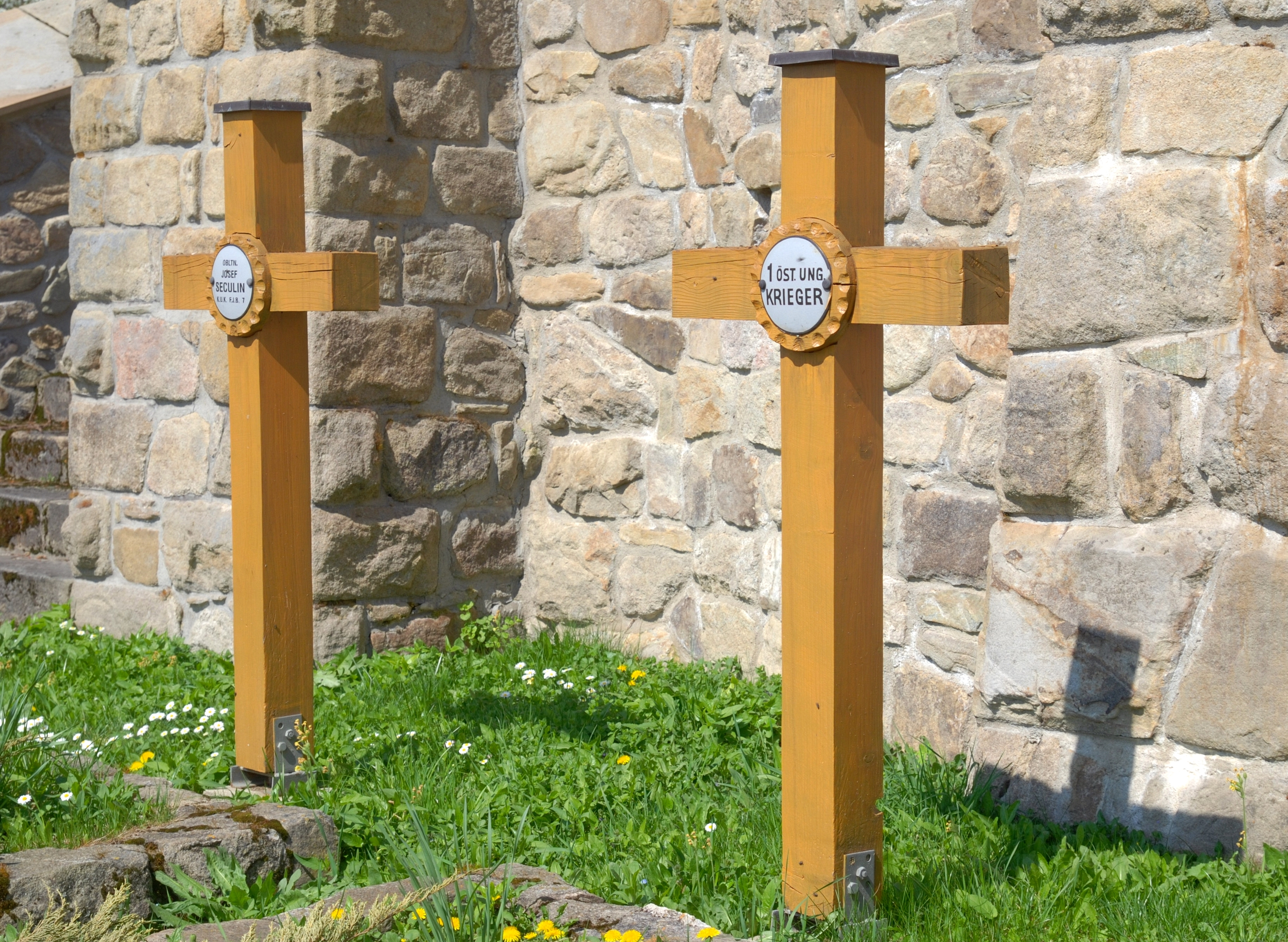 wieś Desznica